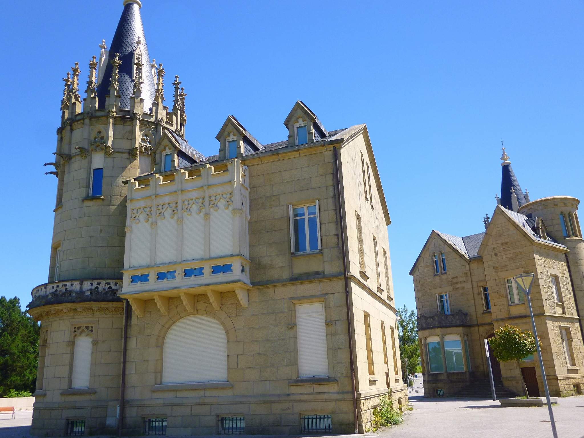 San Sebastián - Parque Científico y Tecnológico de Gipuzkoa - Torres de Arbide (sedes de Kutxa Fundazioa y Biokutxa)